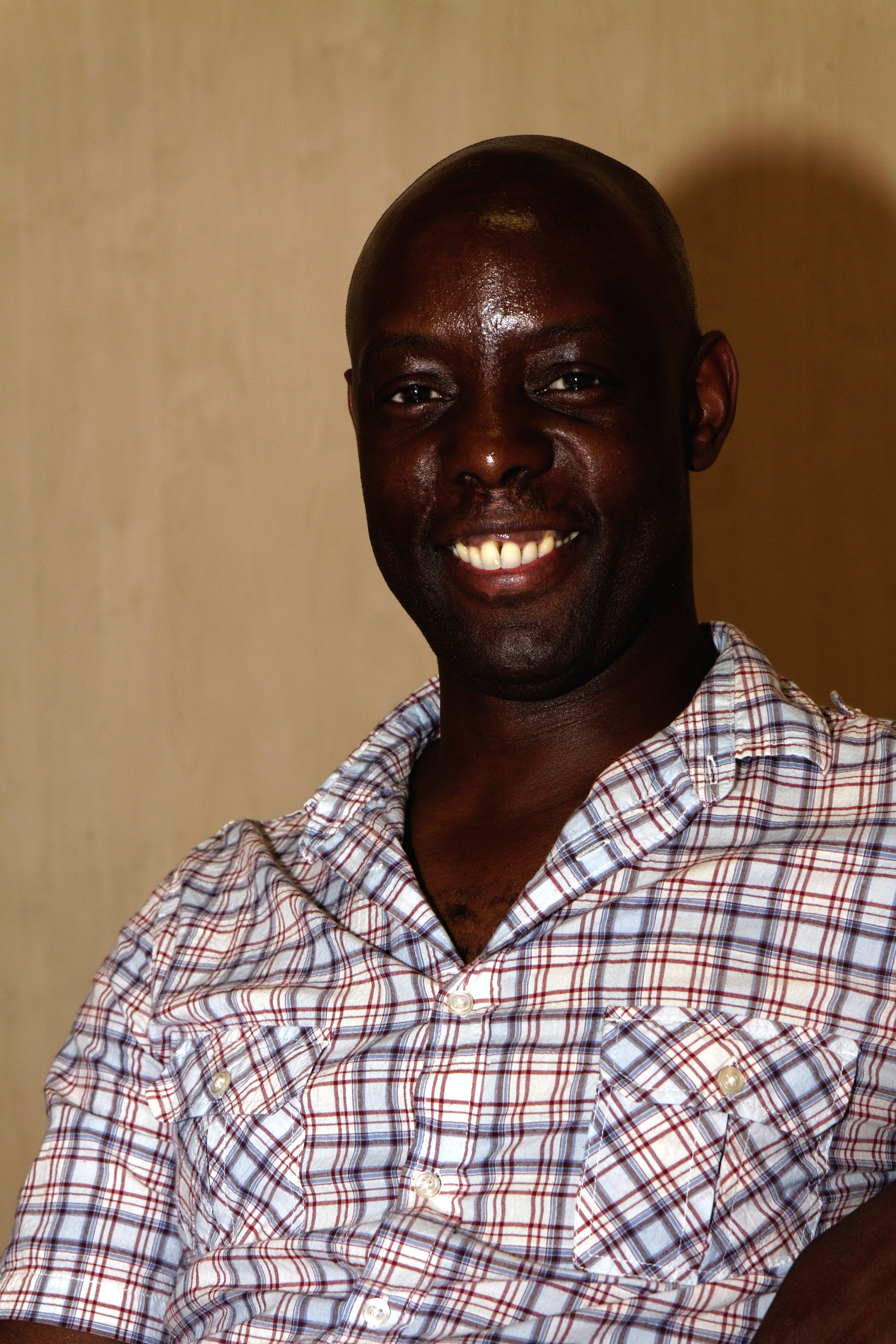 Doug Braithwaite lors du Paris Manga 12ème édition à Paris, porte de Versailles.